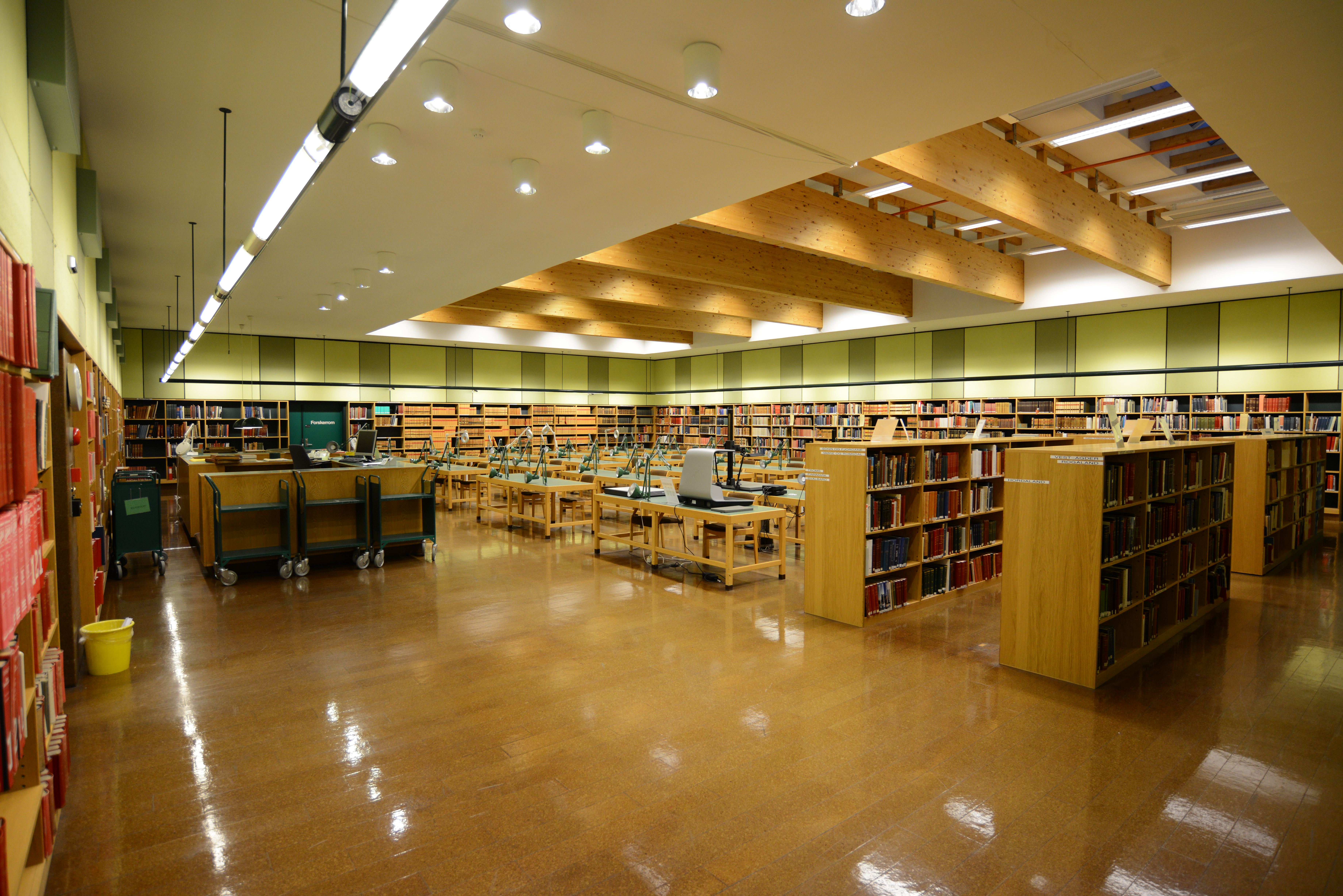 Lesesalen ved Riksarkivet